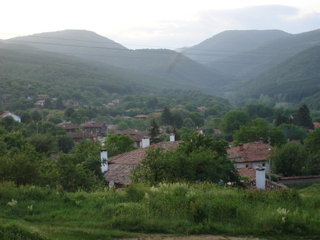 Медвен, Medven